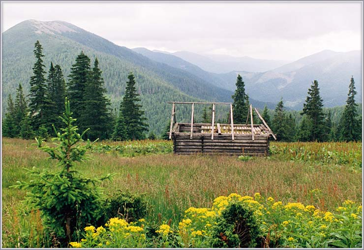 Мисливський будинок на Плісці із залишками крокв даху